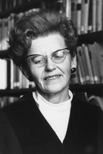 portrett, kvinne, høyesterettsdommer, brystbilde. Norges første kvinnelige høyesterettsdommer.